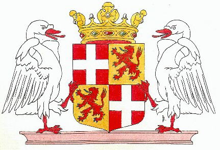 Wapen waterschap Lopikerwaard